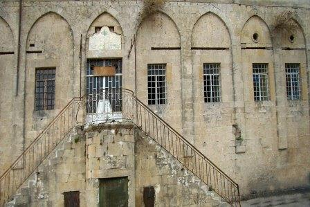 المدرسة الحميدية مشحا